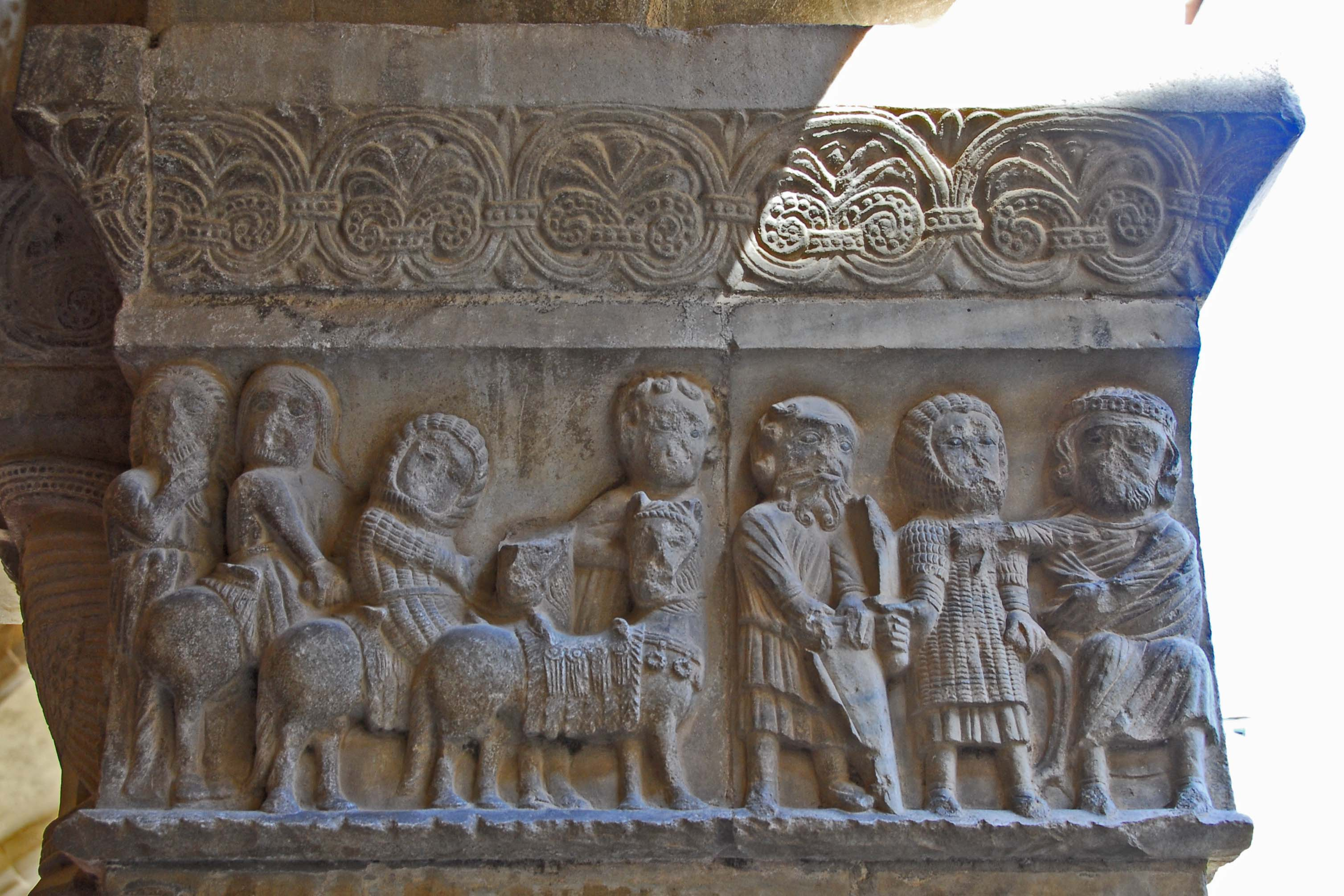 Ste-Eulalie-et-Ste-Julie_d’Elne, Pfeilerkapitell Westgalerei, König mit Ritter